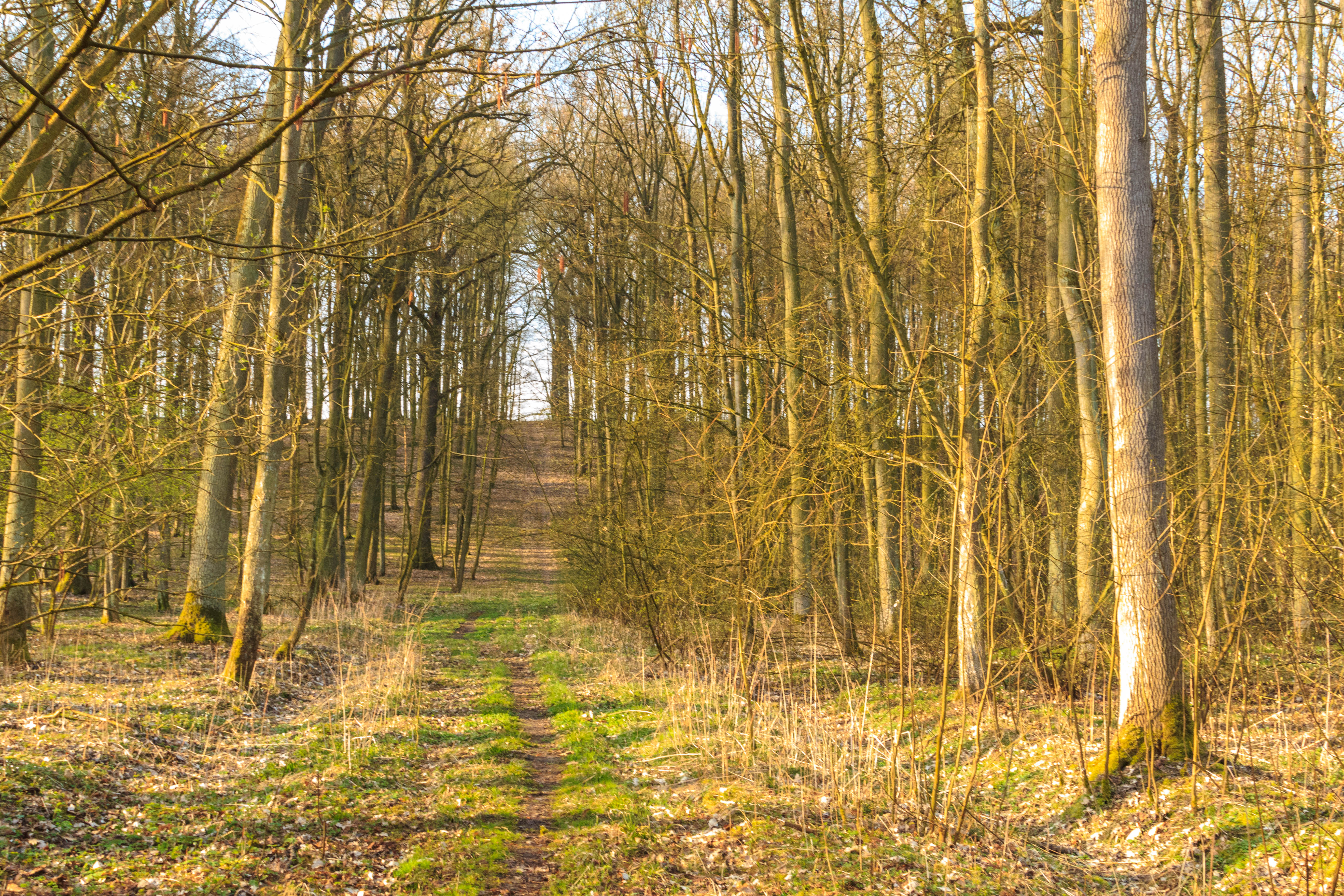 PR Hořivěveská bažantnice Project: Chráněná území.